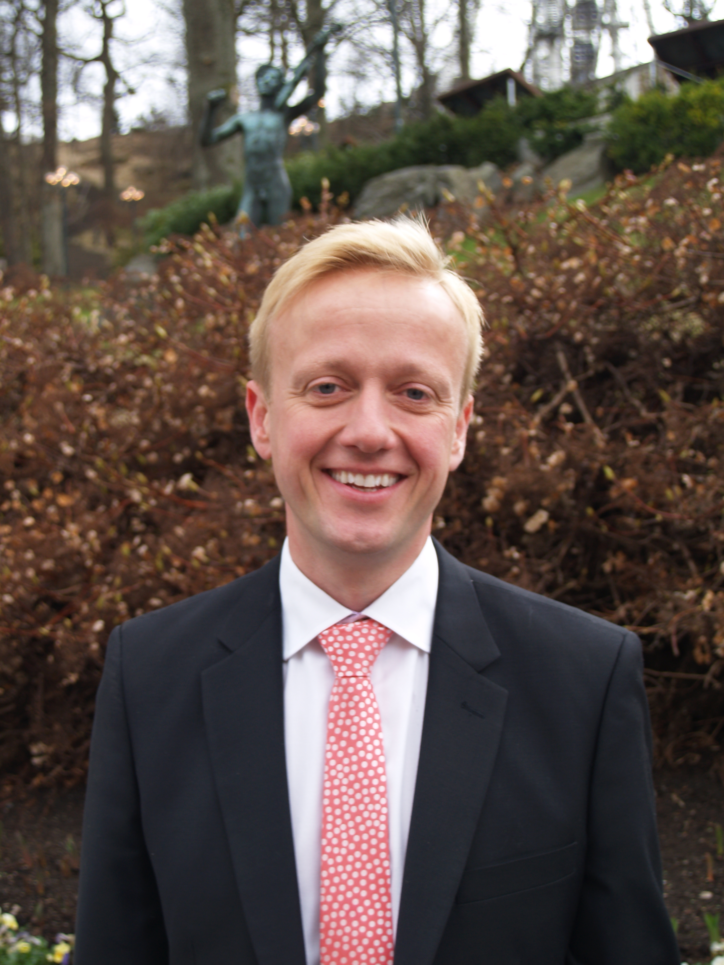 Lisebergs VD Andreas Andersen strax efter säsongspremiären 2013.